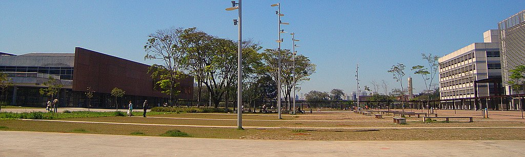 Panorama do Parque da Juventude em Santana